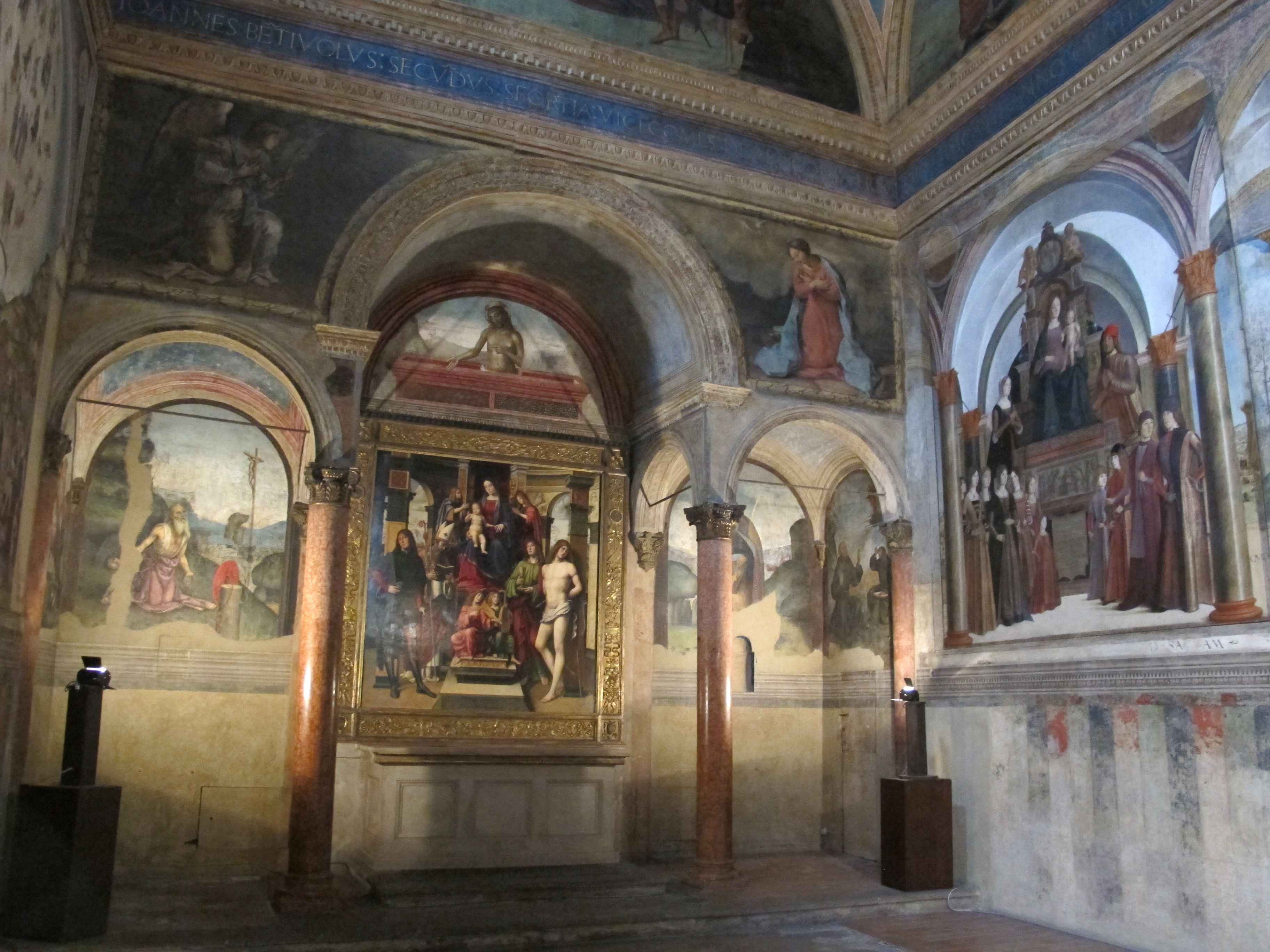 San Giacomo Maggiore (Bologna)